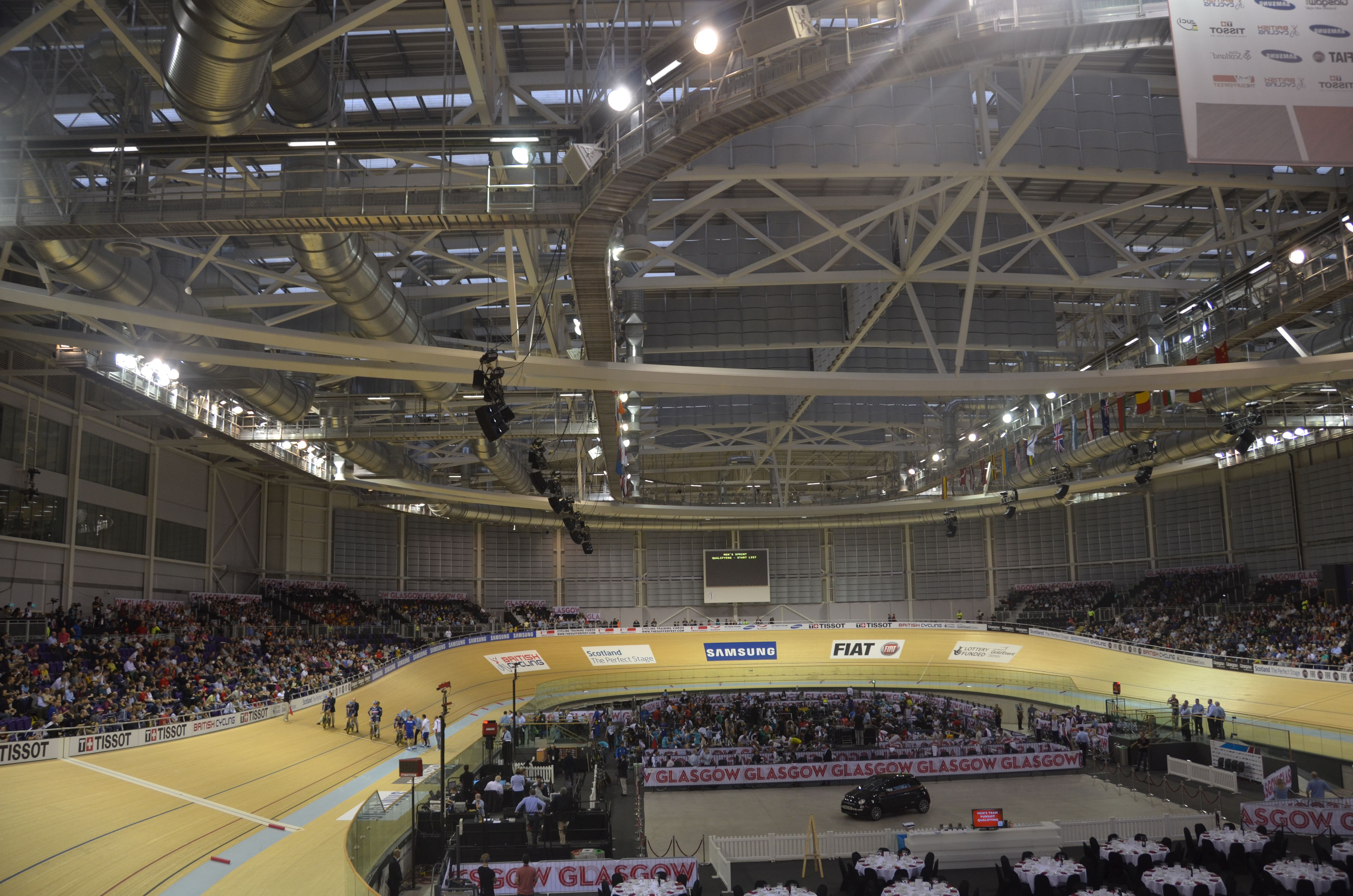 Bahnrad-Weltcup 2012